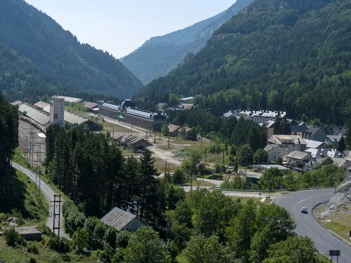 31082013 135740 PIRINEO 19384